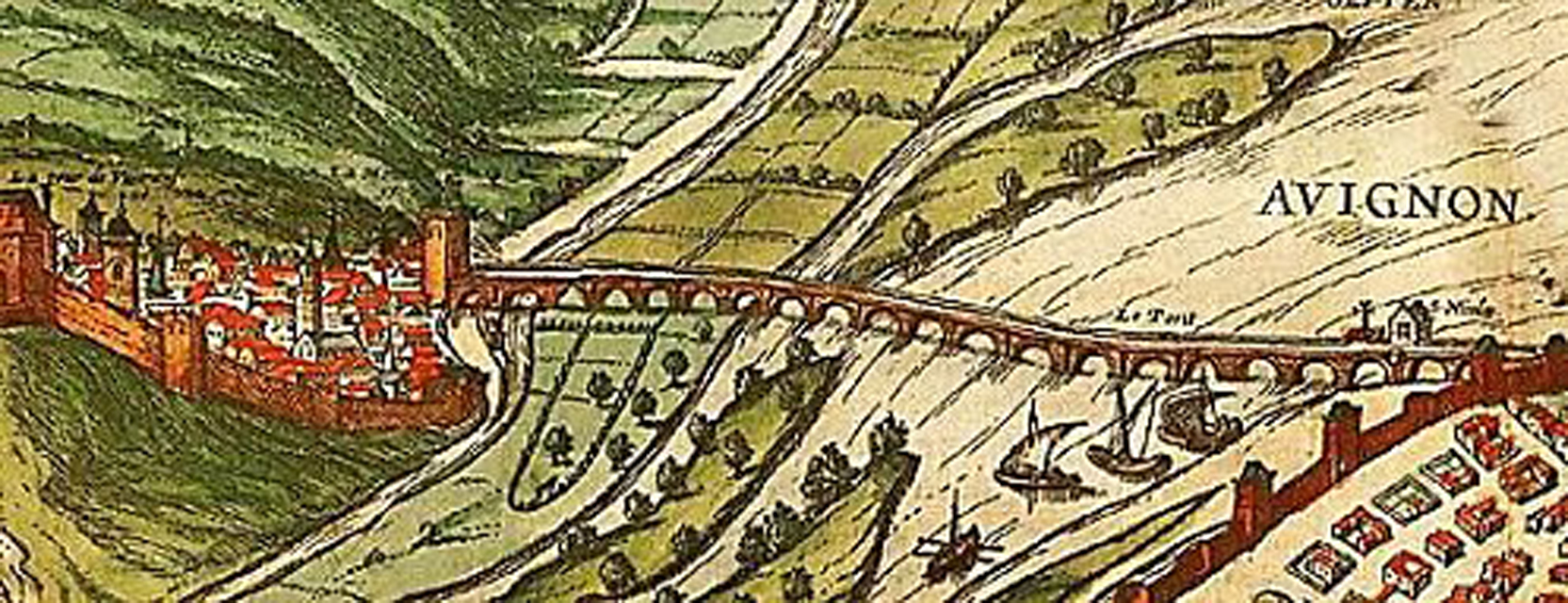 Pont Saint Bénézet Gravure de Mamigoz